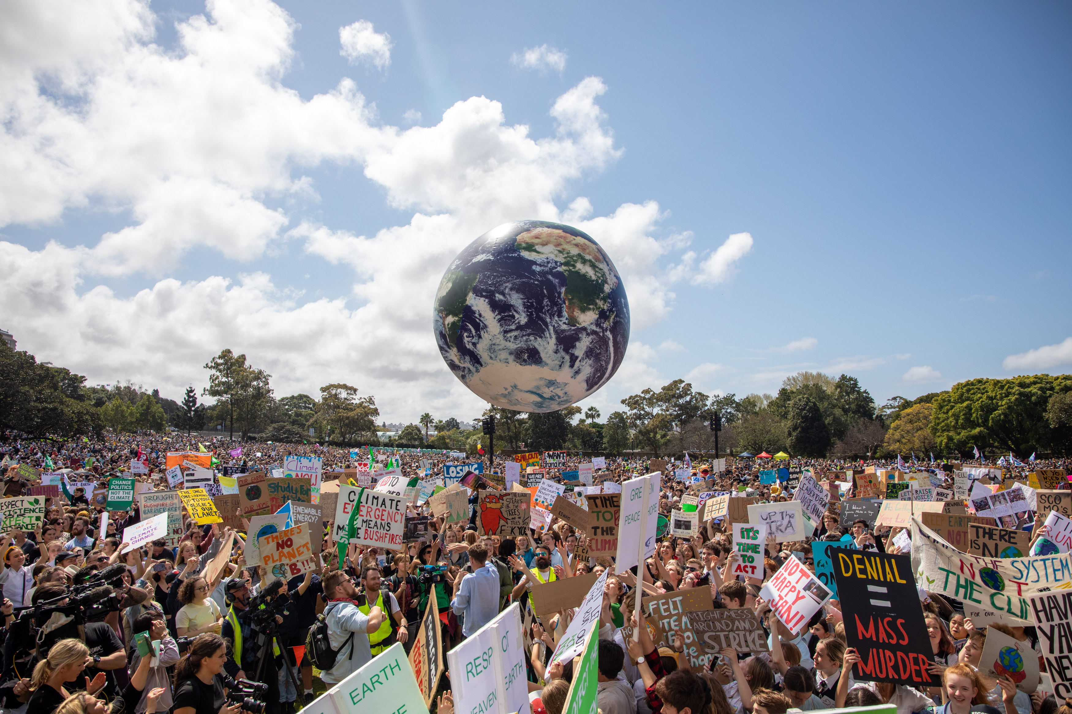 Sydney - Marcus Coblyn